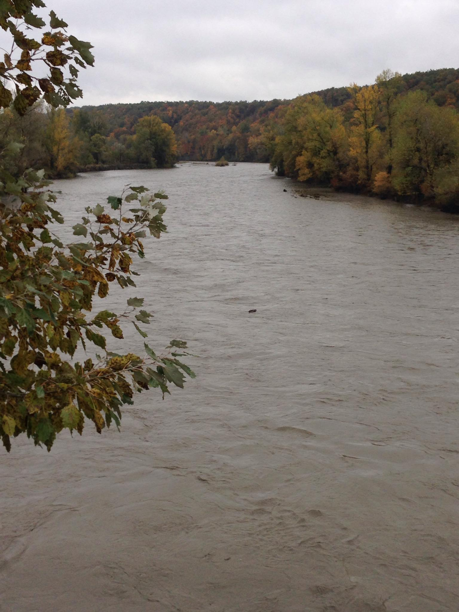 Река Белая у станицы Ханская